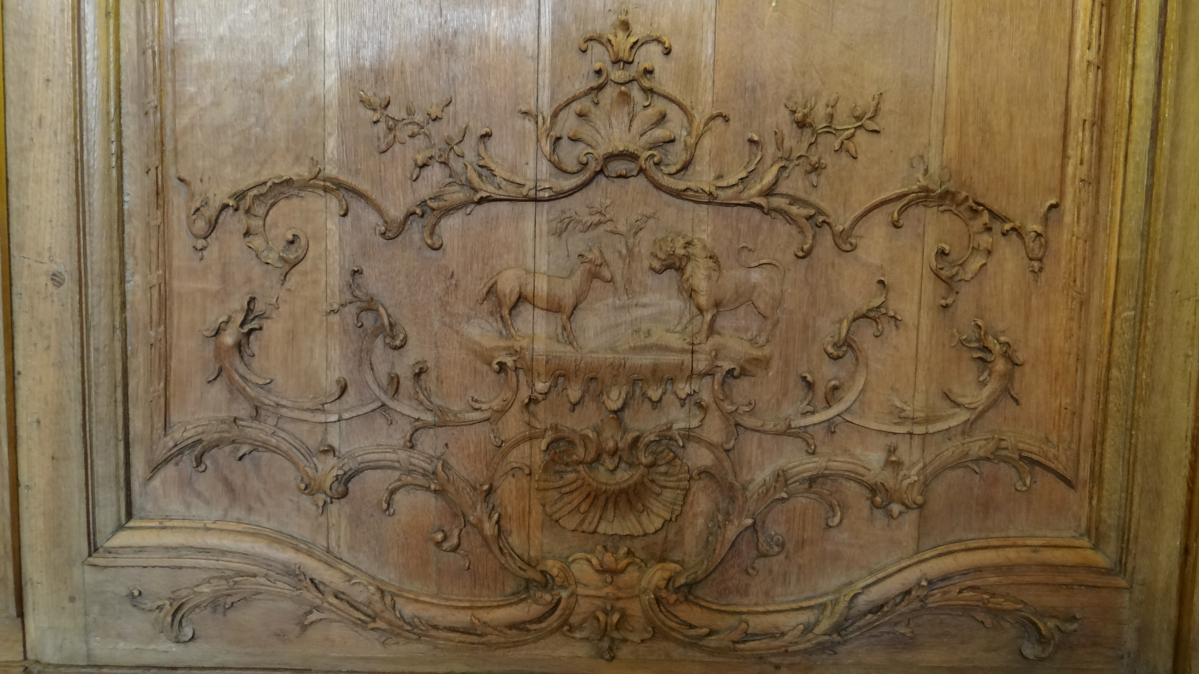 fable de La Fontaine, la Génisse, la Chèvre, la Brebis en société avec le Lion, Boiseries de la salle à manger de l'Hôtel de Noirmoutier, Paris .